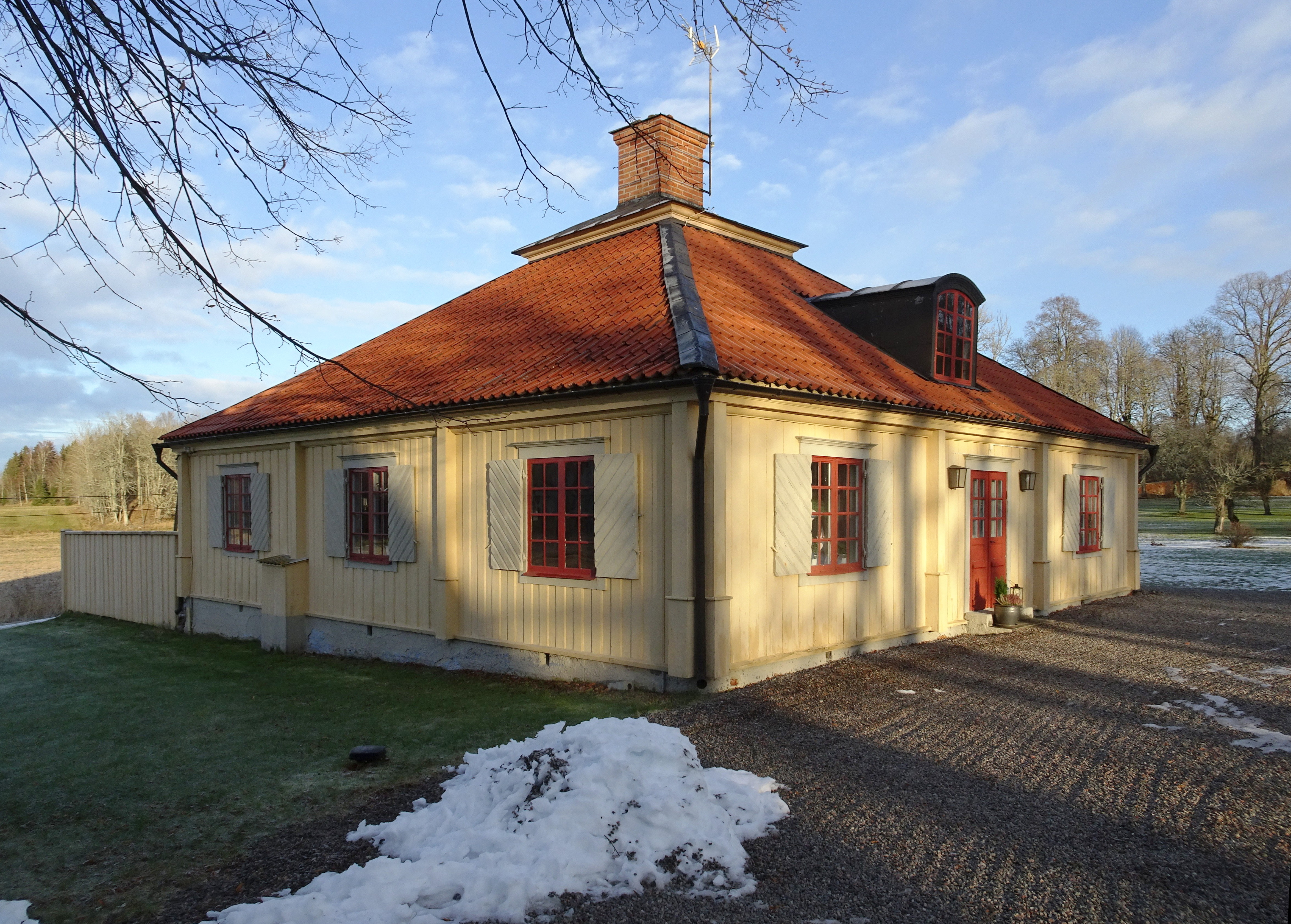 Måstena norra flygeln